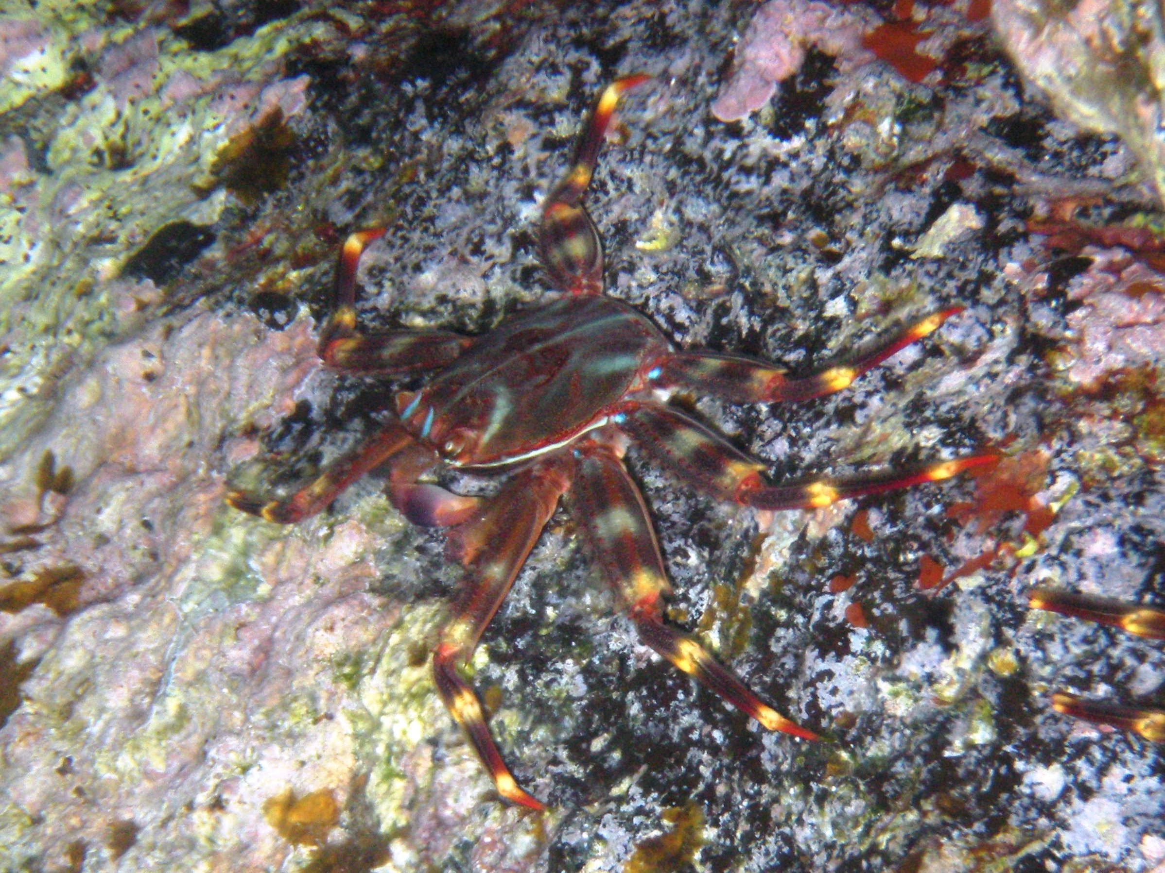 Percnon gibbesi Linosa, Sicily